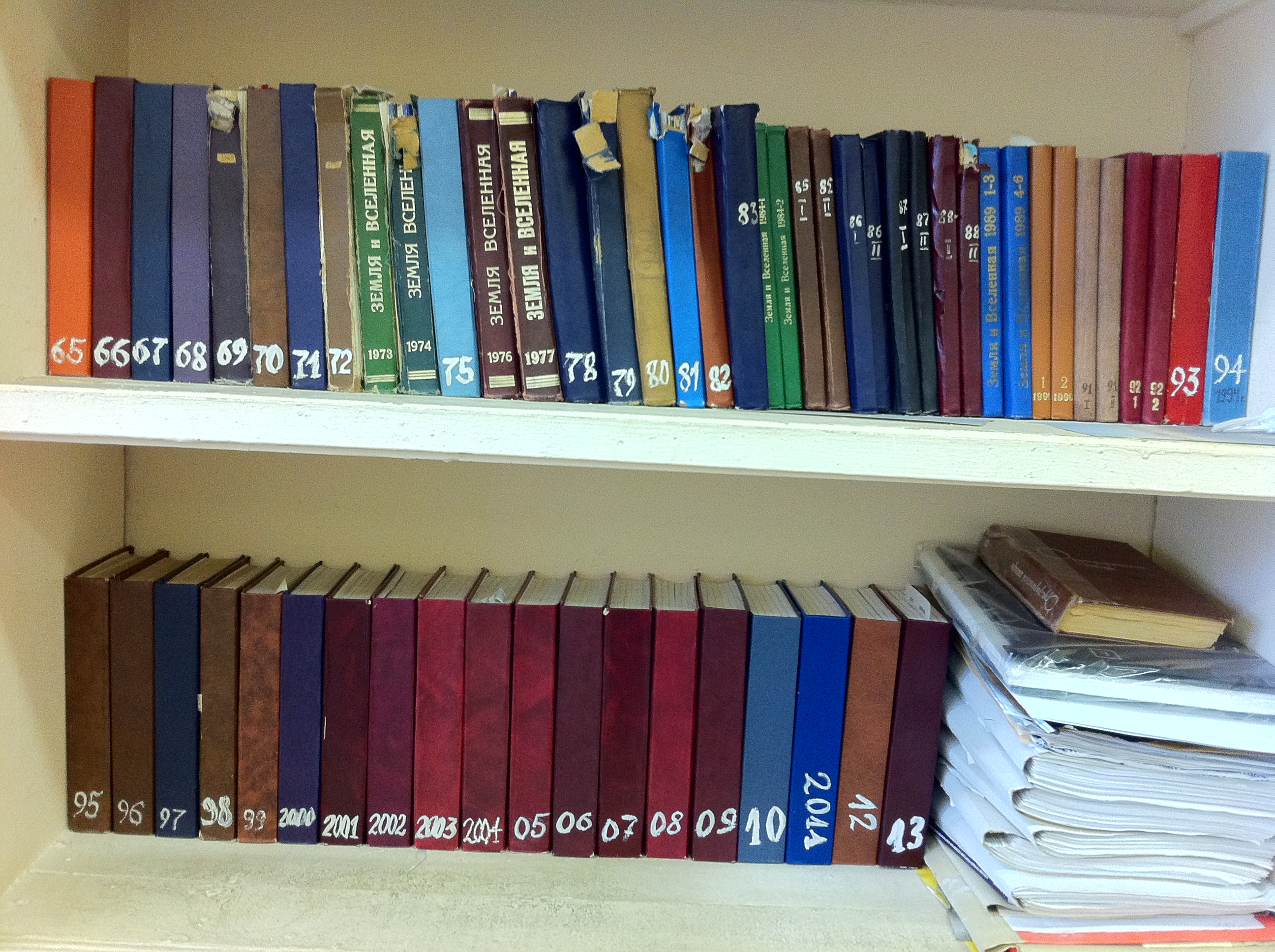 Подшивка журнала "Земля и Вселенная". Редакция журнала, 2014 г.